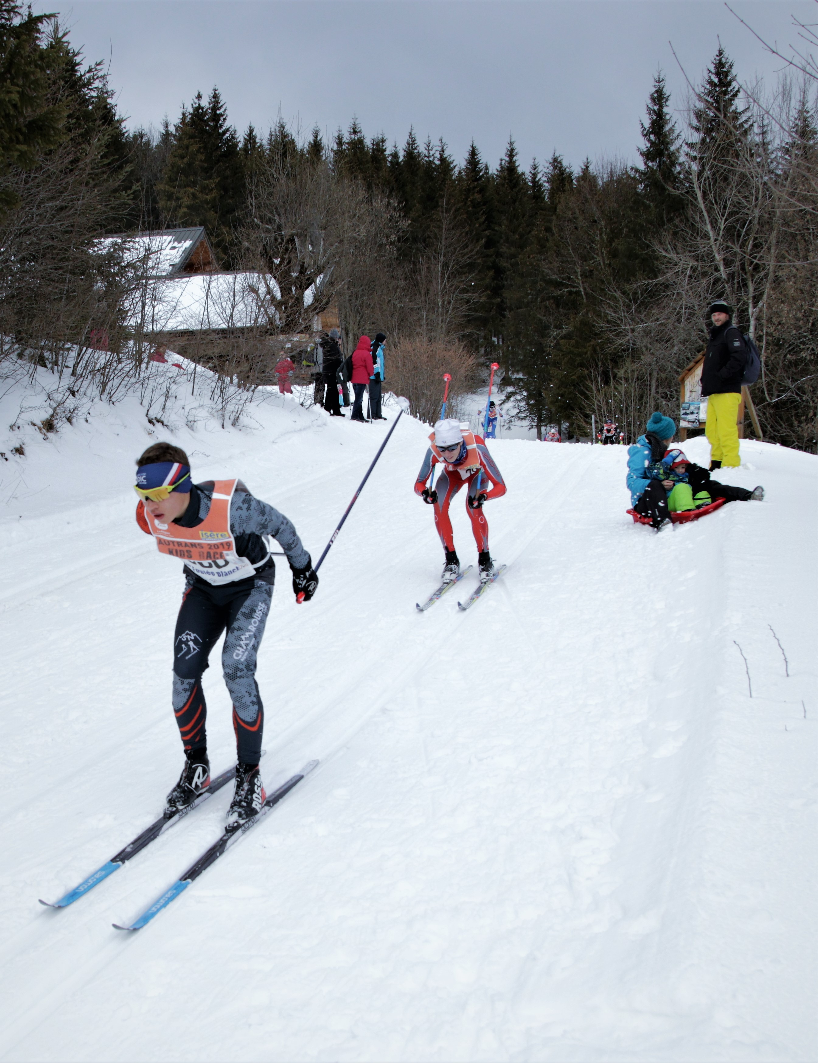 Foulée blanche 2019, à Autrans, Autrans-Méaudre-en-Vercors, Isère, AuRA, France.